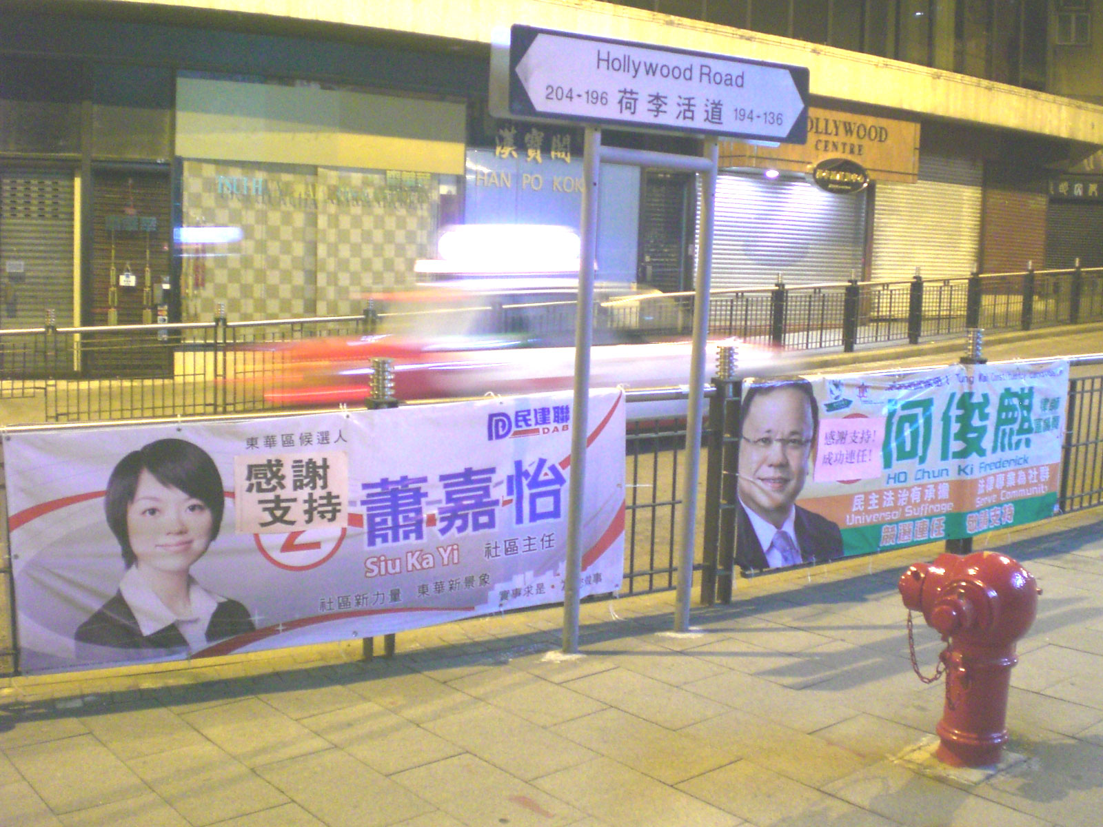 2007年區議會選舉謝票Banners 上環荷李活道近水坑口街